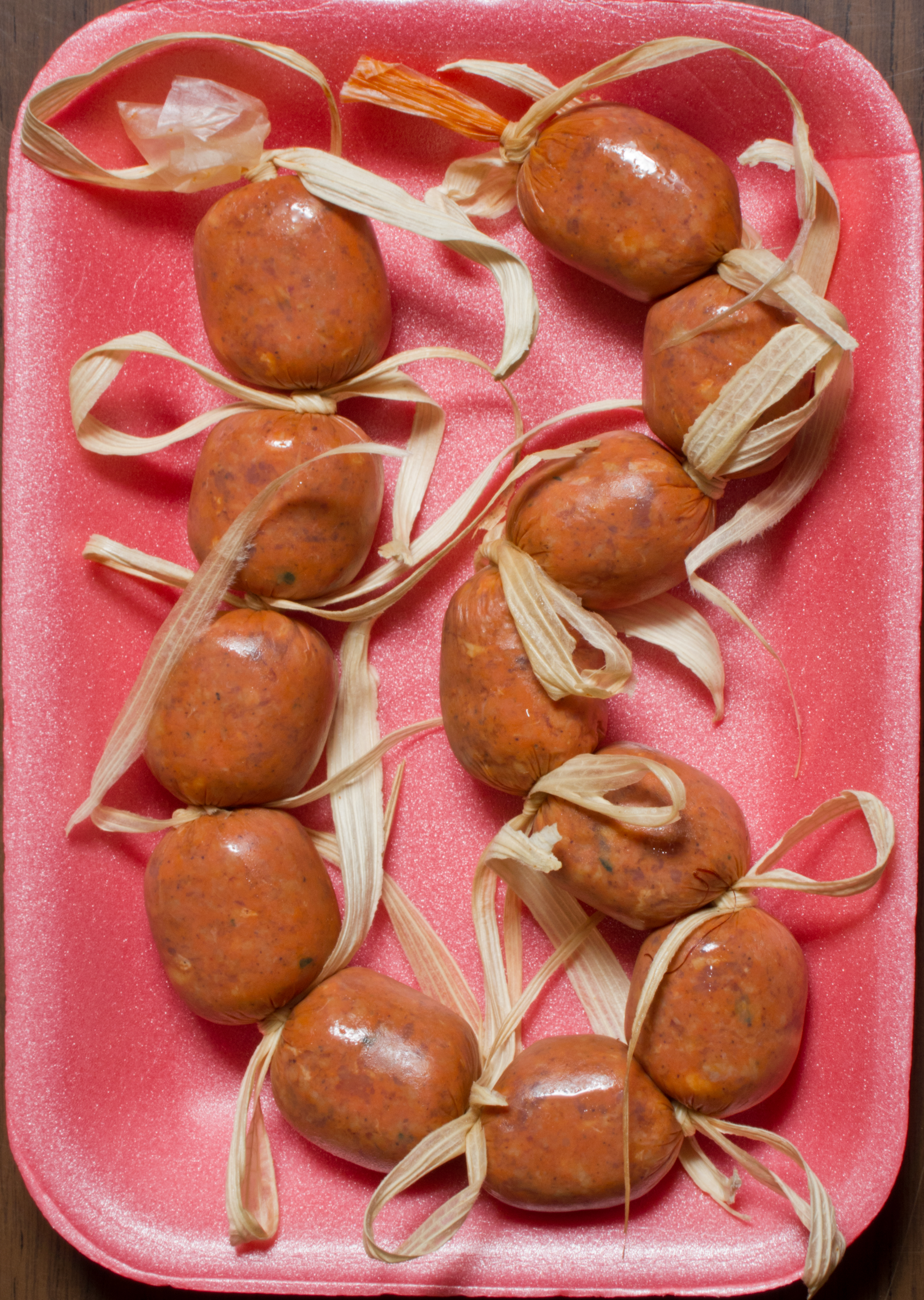 Ejemplo de chorizos hechos en Cojutepeque, El Salvador